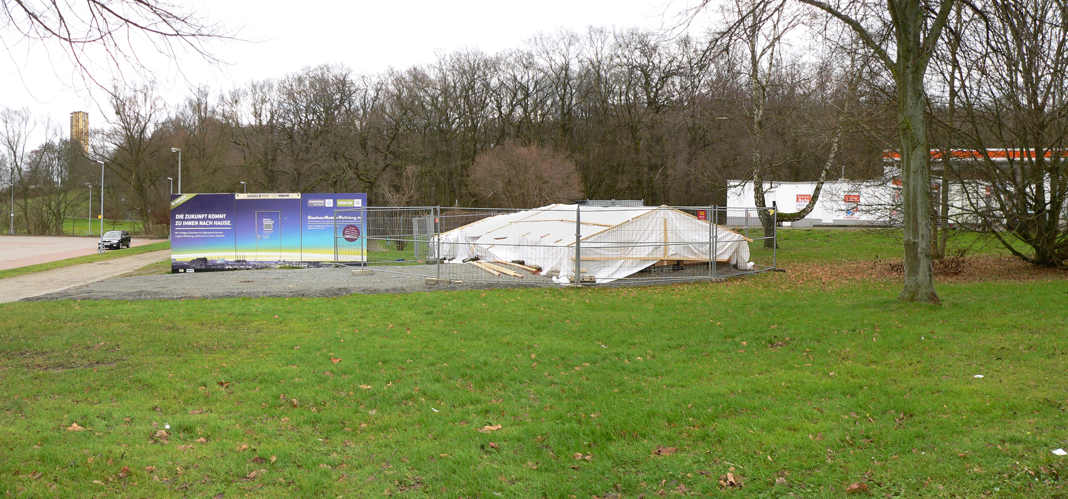 Fläche der geplanten Gedenkstätte für das KZ-Außenlager Laagberg mit gegen Witterung geschützte, einlagernden Blockbergungen der Fundamenten der Baracke 4